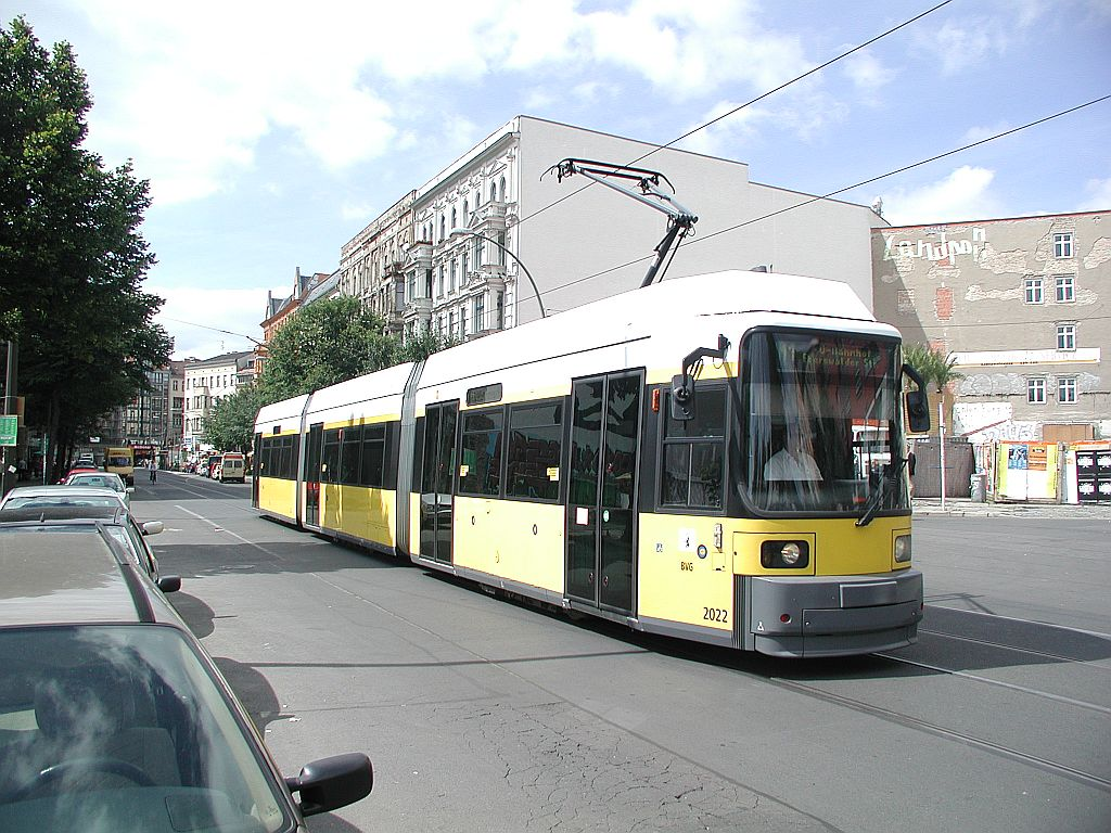 BVG Tram Nr. 2022 an der Oranienburger Straße